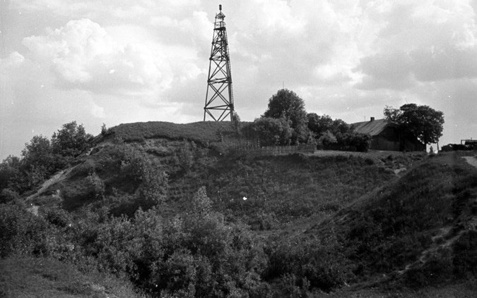 Piliakalnio šiaurės vakarų nukastas šlaitas, buvusio dvaro pastatas